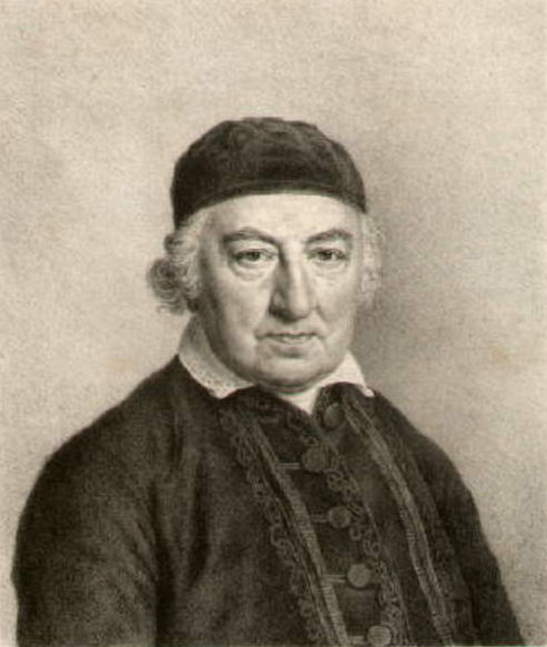 Rudolph Gerhard Behrmann (1.12.1743 – 29.7.1827), Doktor der Theologie, Archidiacon zu St. Petri in Hamburg